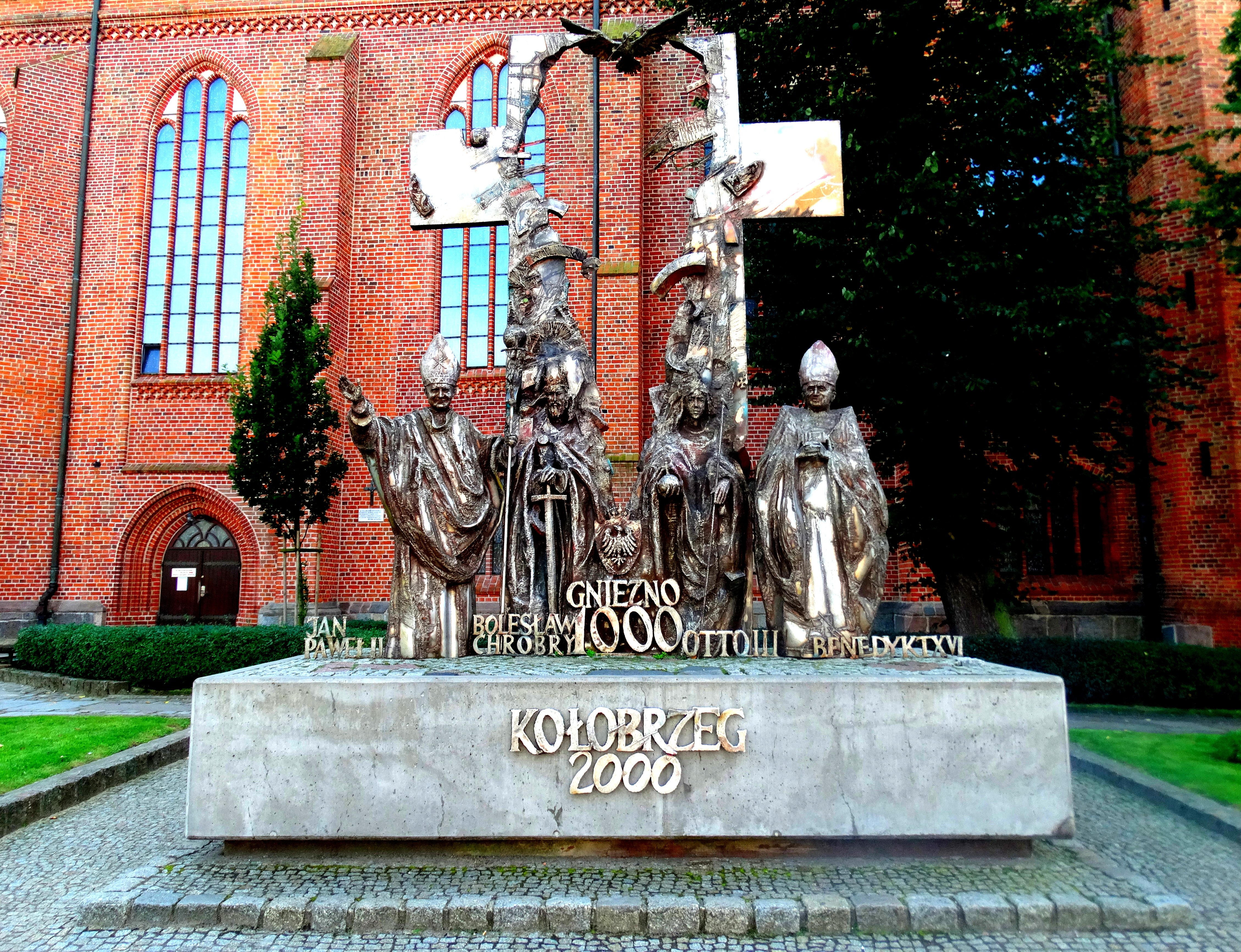 Kołobrzeg. Pomnik Tysiąclecia autorstwa Wiktora Szostało przed bazyliką konkatedralną pw. Wniebowzięcia Najświętszej Maryi Panny Wikidata has entry Q1779076 with data related to this item.